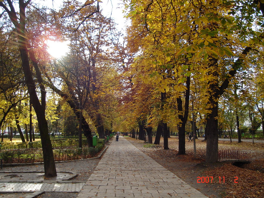 Kolozsvári sétatér ősszel